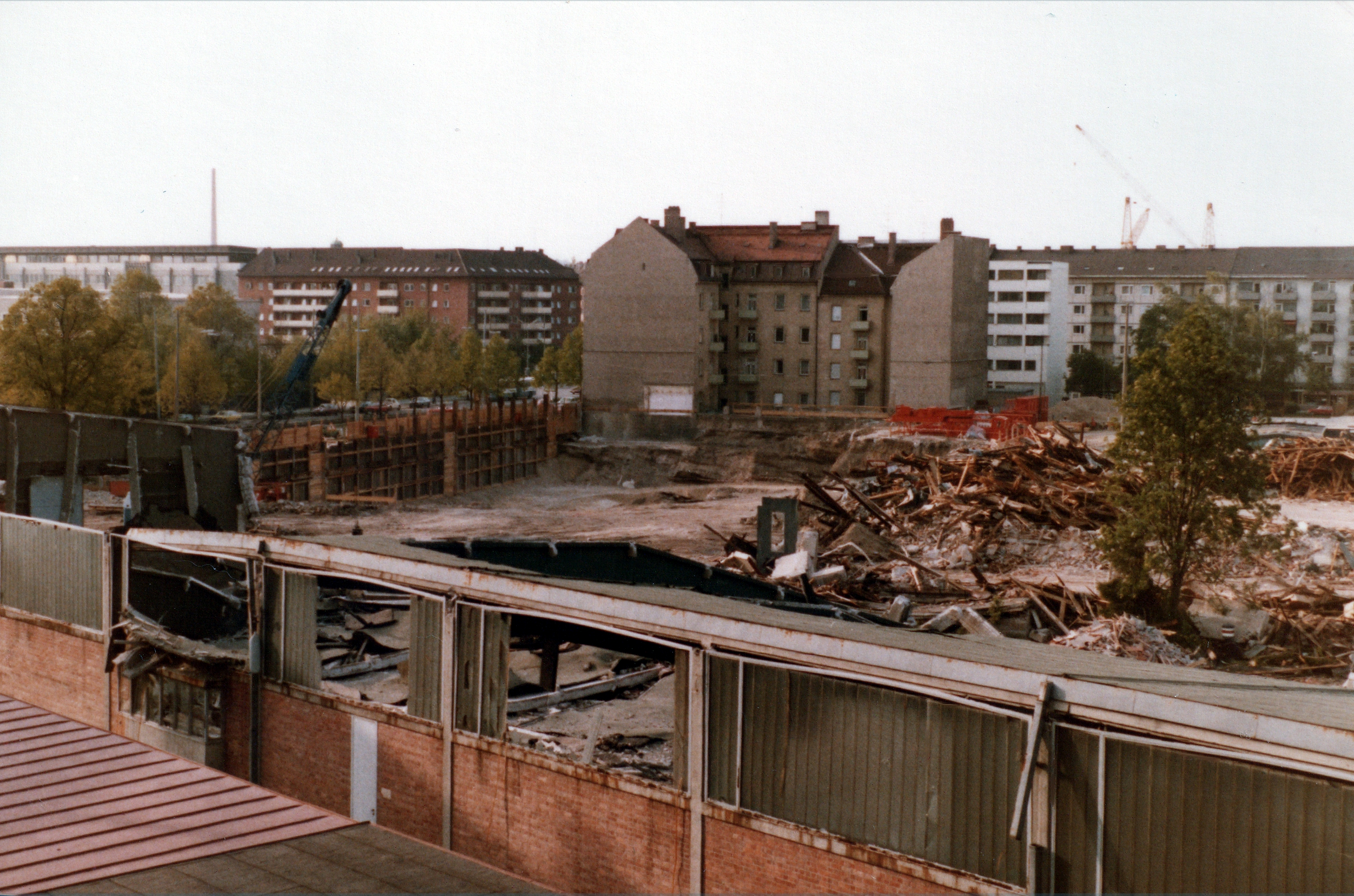 Abbrucharbeiten 1980 am seit 1972 stillgelegten Straßenbahndepot an der Schlierseestraße (München). Foto mit Blick nach Norden auf das Gelände, von links in die Bildmitte verlaufend Schlierseestraße, von links nach rechts laufend Werinherstraße.